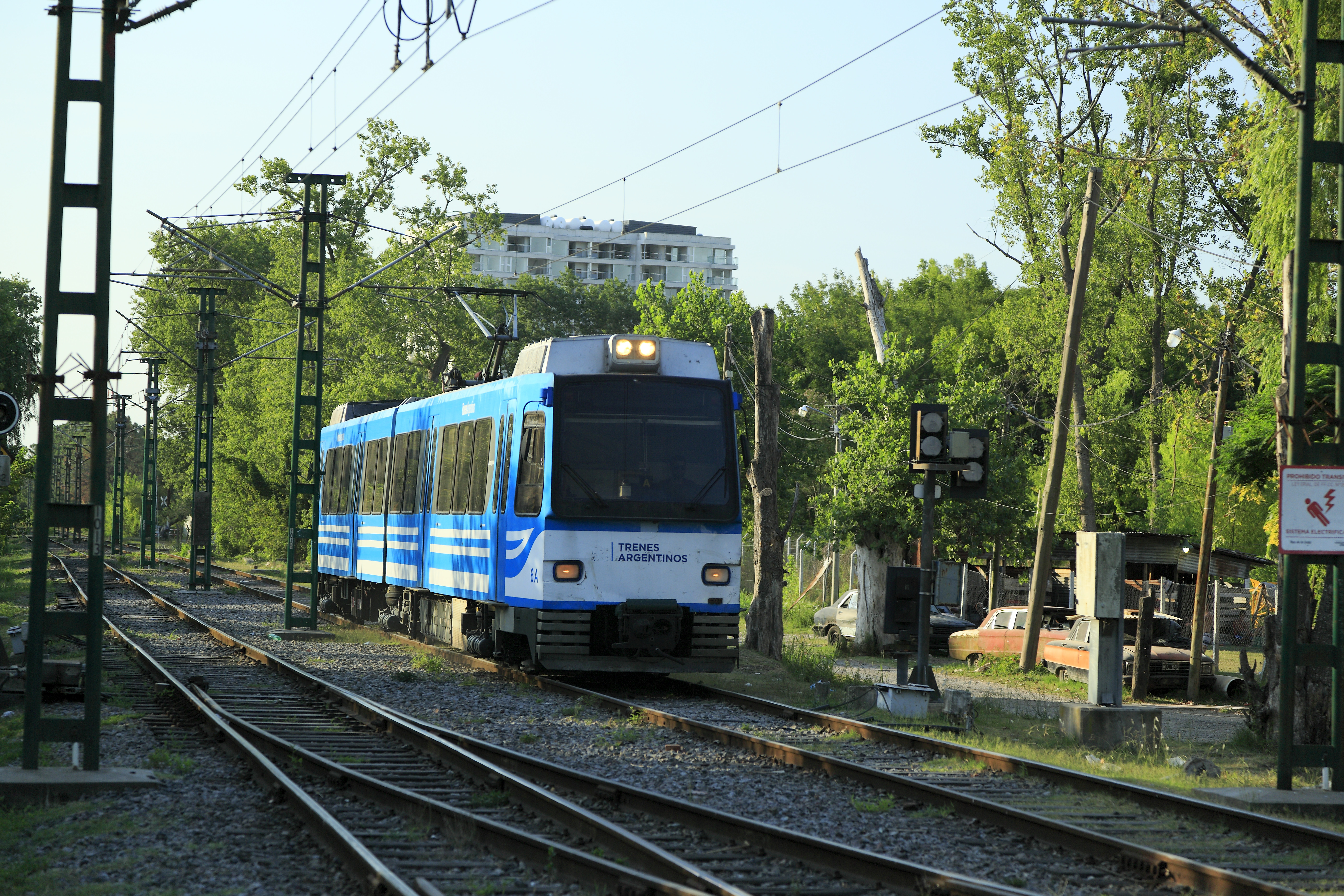 Zug von Delta stadteinwärts nach Maipú auf Höhe des Einfahrsignals. Sicherungstechnisch ist auch diese Strecke nach britischen Normen ausgerüstet. Mit Schutzabschnitten haben es die Engländer weniger.